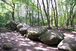 Großsteingrab Werlte Urheber: Niermann, Werlte Touristik Freigabe per Mail geklärt --Flominator 19:22, 24. Mai 2006 (CEST) Ticket#: 2006052410010951